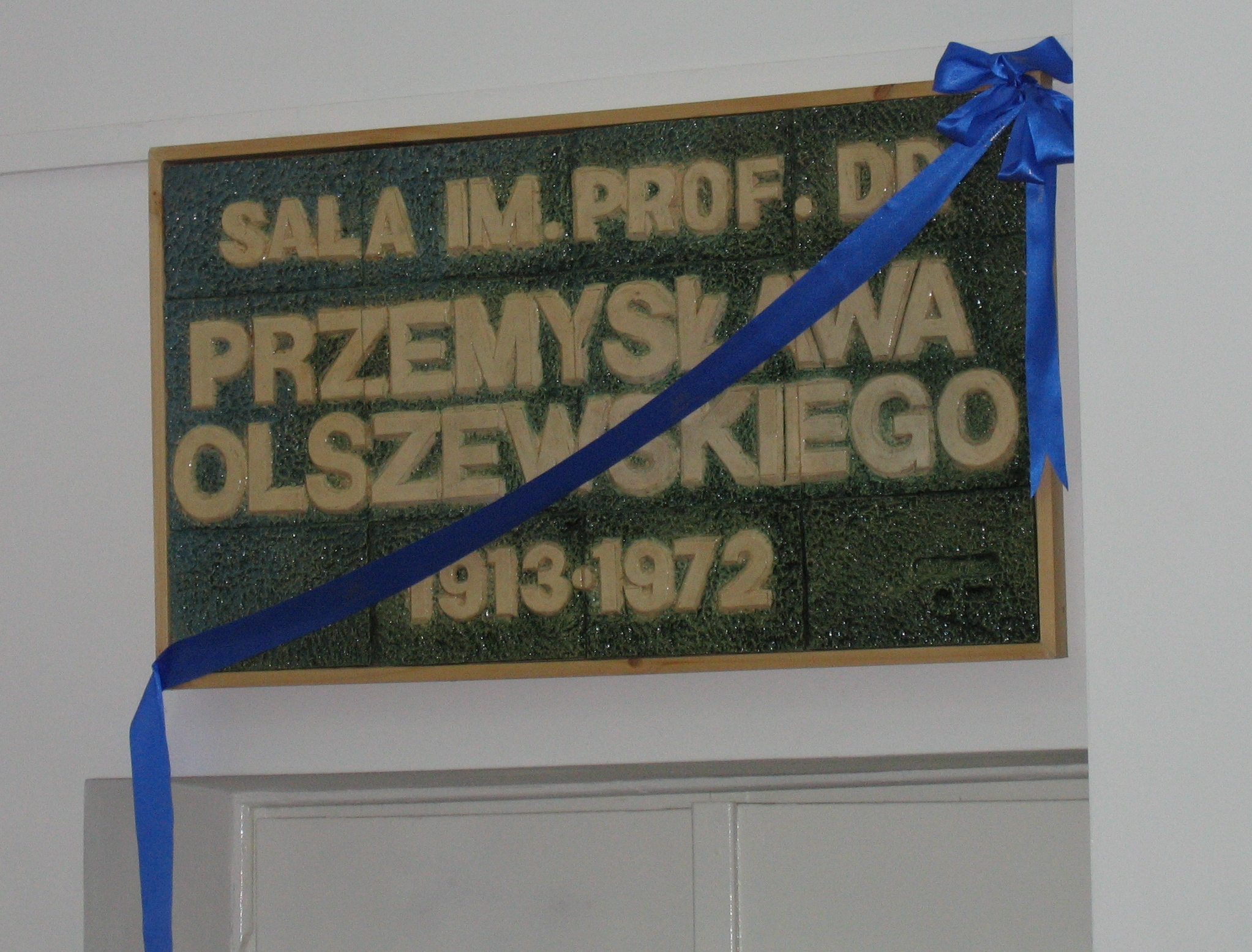 Otwarcie auli im. prof. Olszewskiego